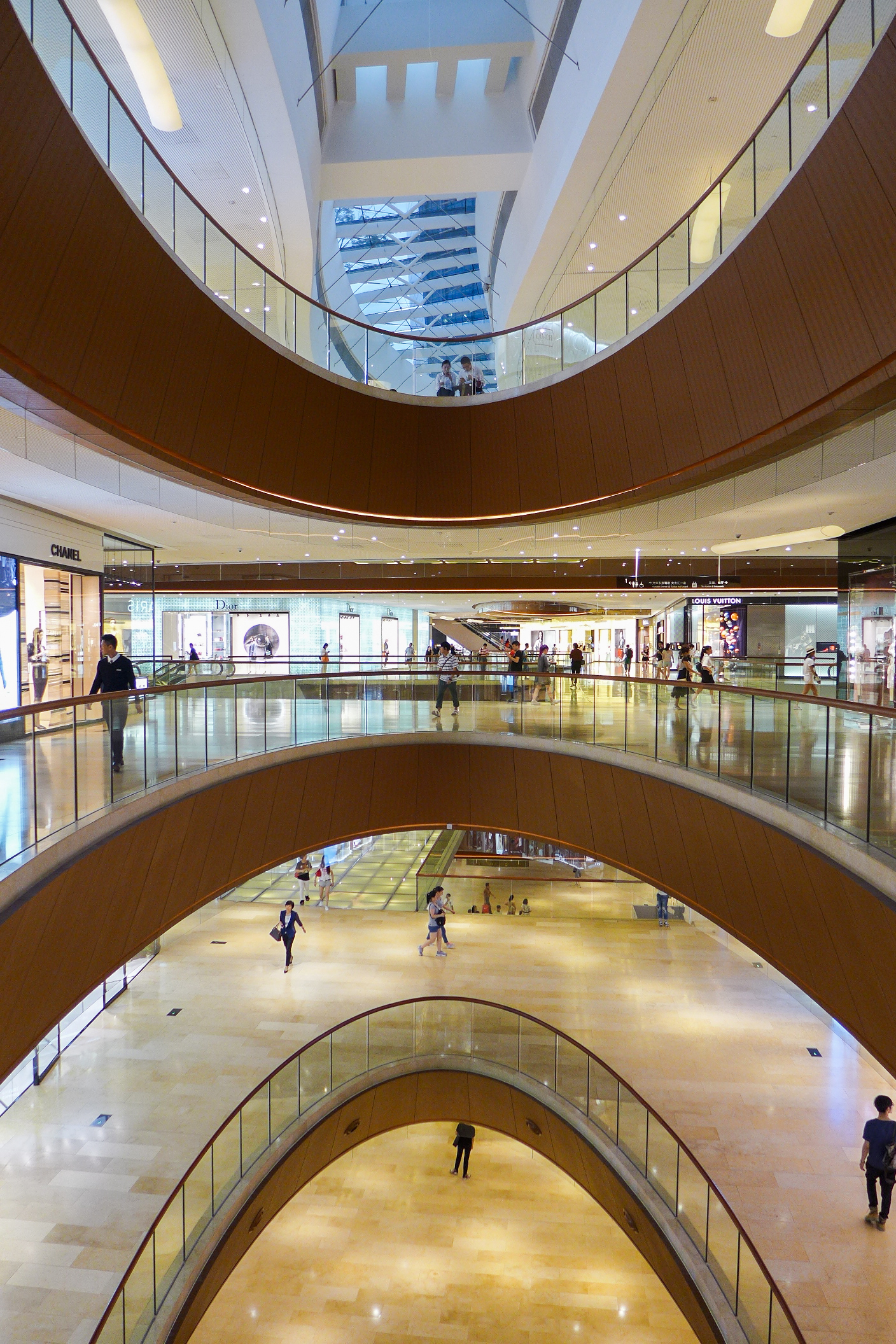 Taikoo Hui Arcade